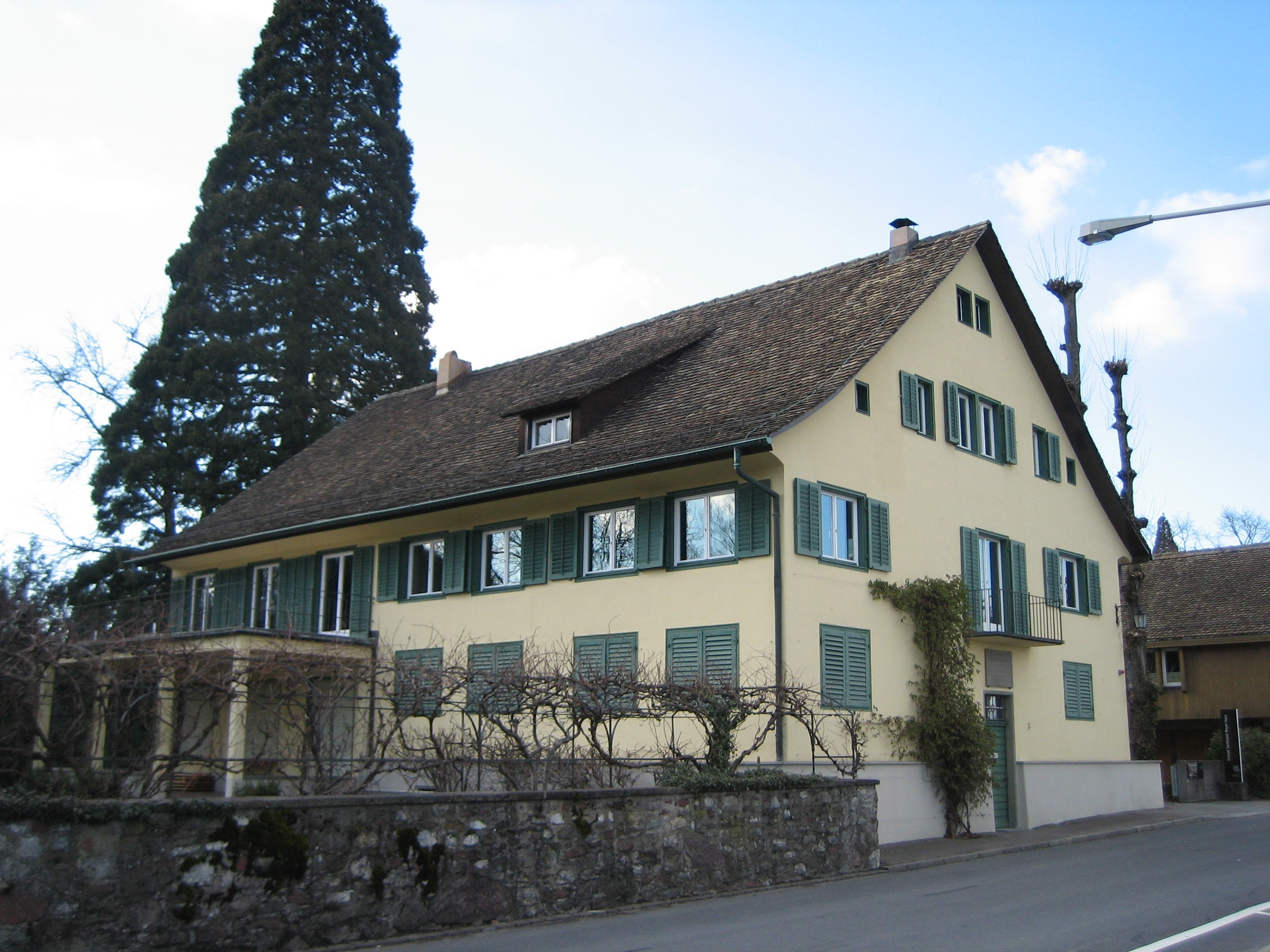 Ehemaliges Wohnhaus des Dichers Conrad Ferdinand Meyer in Kilchberg ZH, Alte Landstrasse 170. 1943–1964 befand sich darin die Amtswohnung von Pfarrer Eduard Schweingruber.